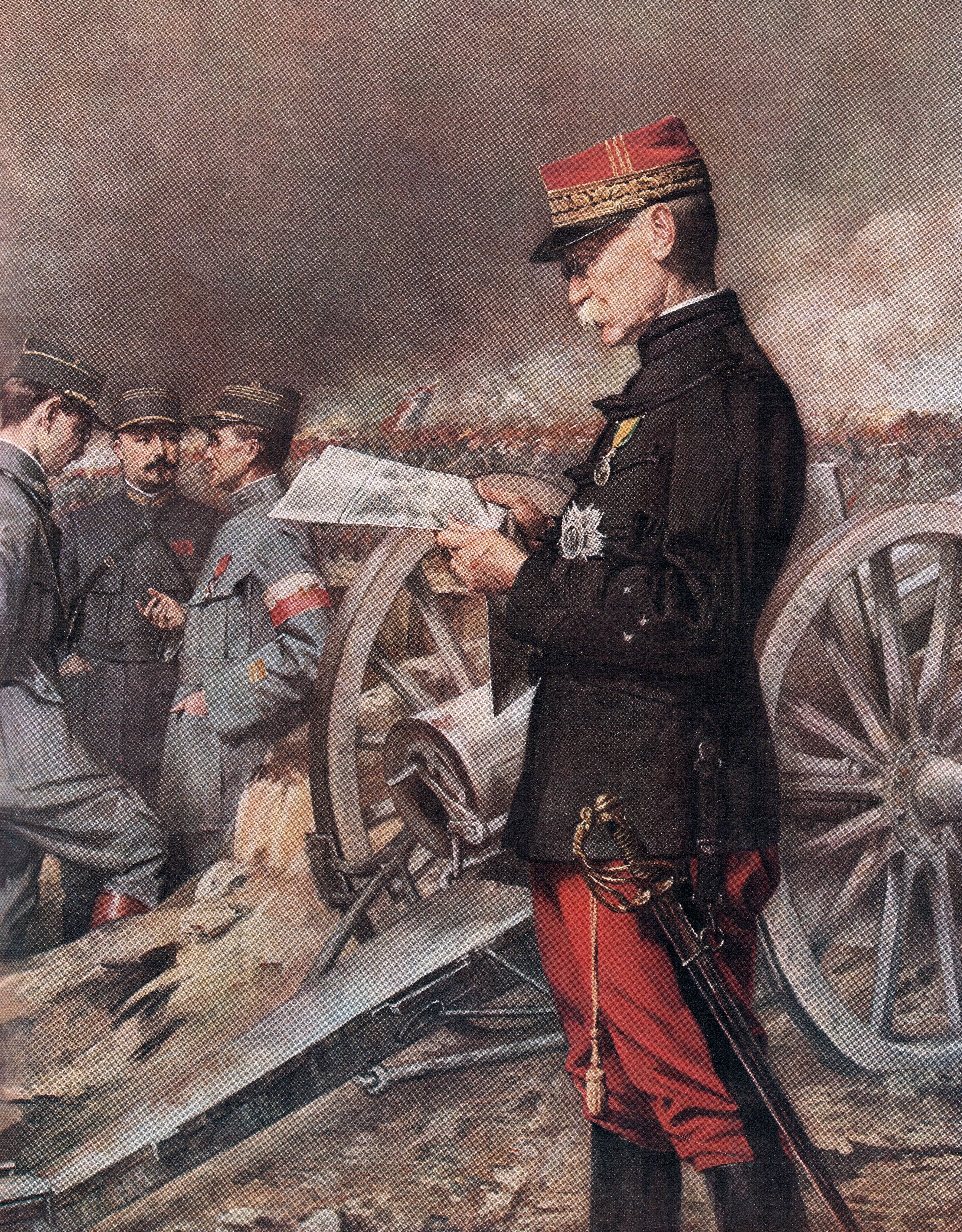 Le général Joseph Galliéni, detail